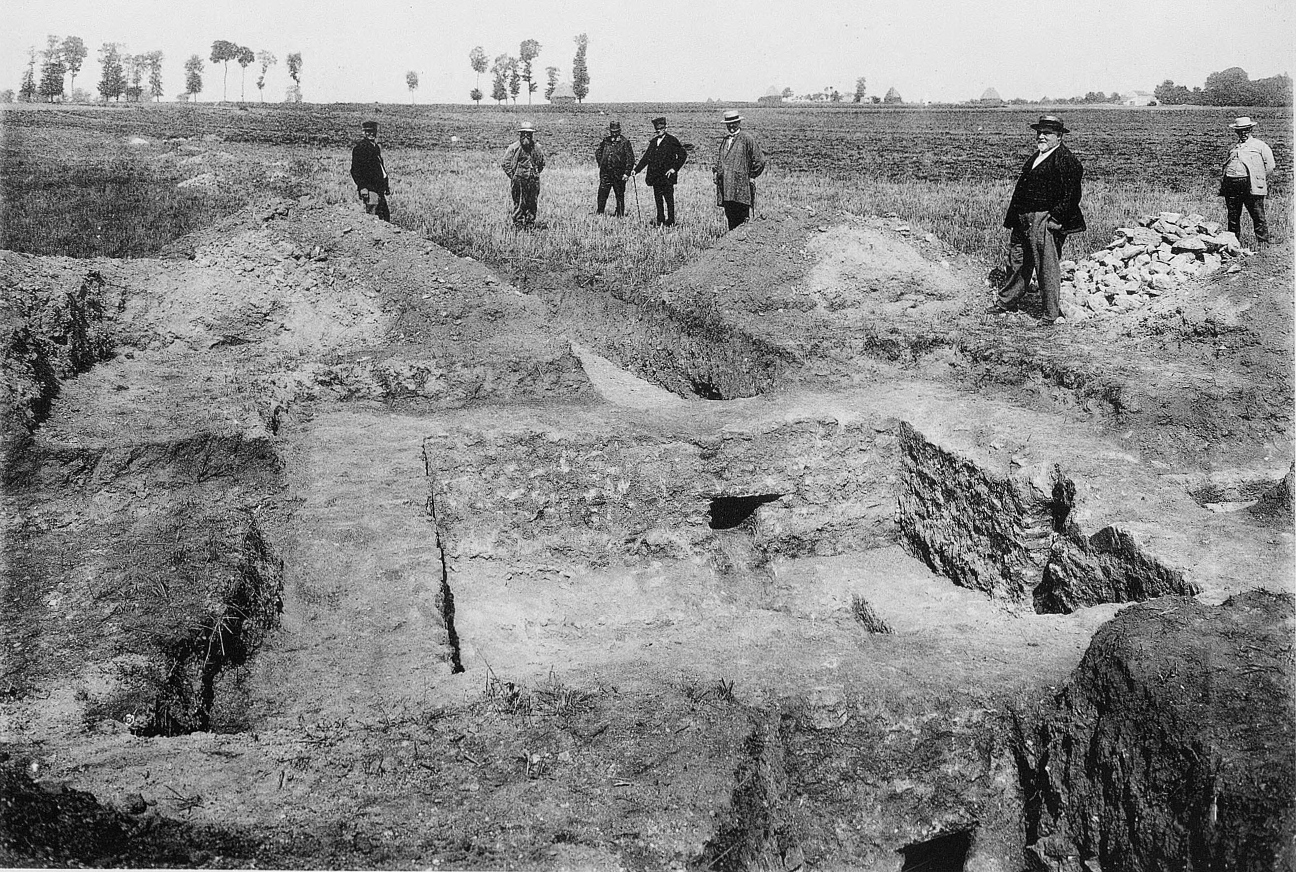 Procès-verbaux Commission municipale du (...)Paris Commission bpt6k58204671 59